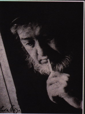 Славољуб Слава Богојевић.